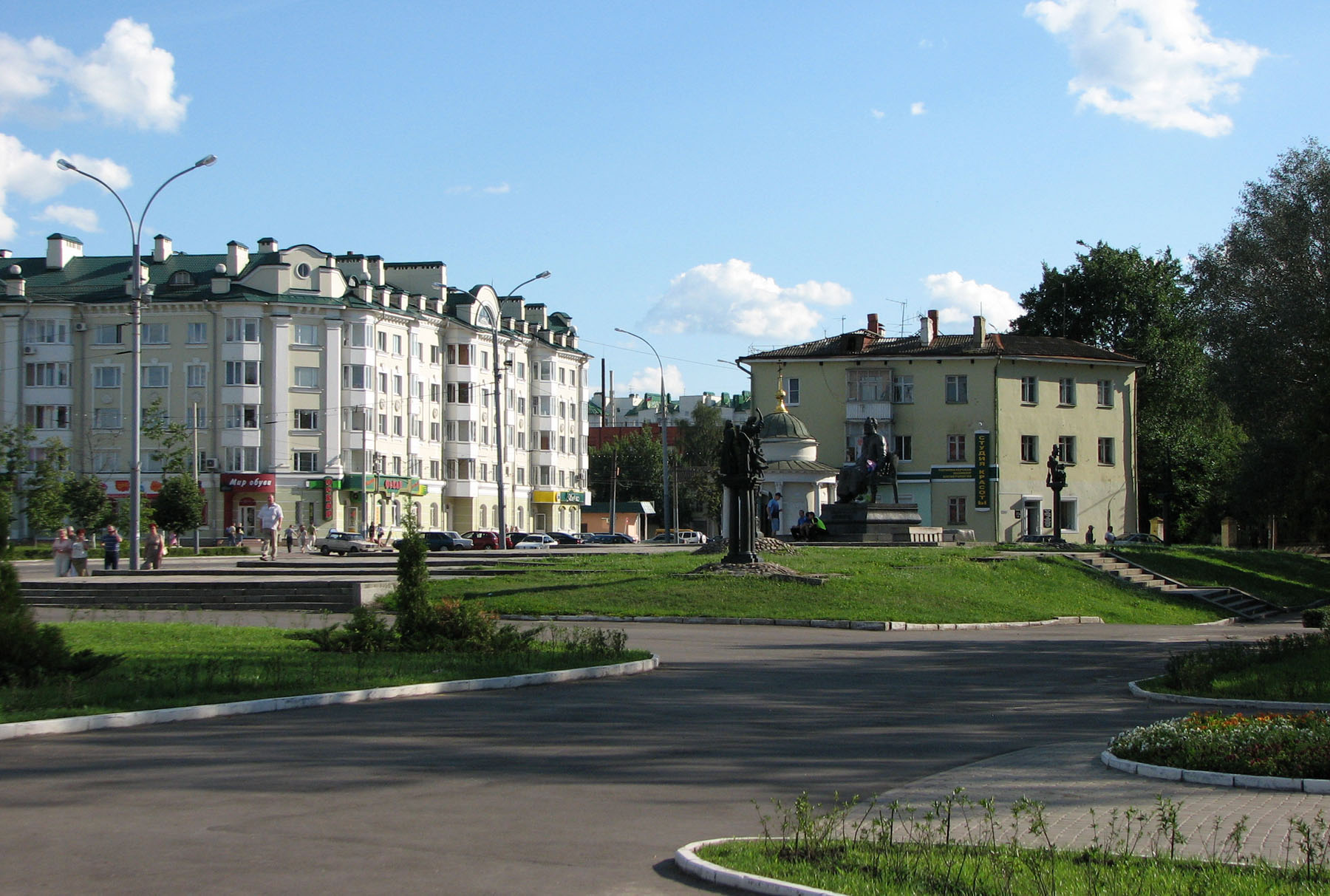 г. Орёл